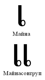 Майна